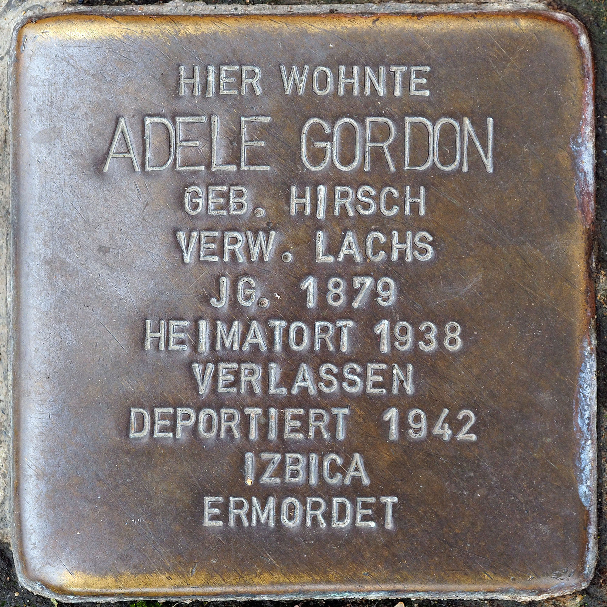 Stolpersteine GV: Gordon Adele